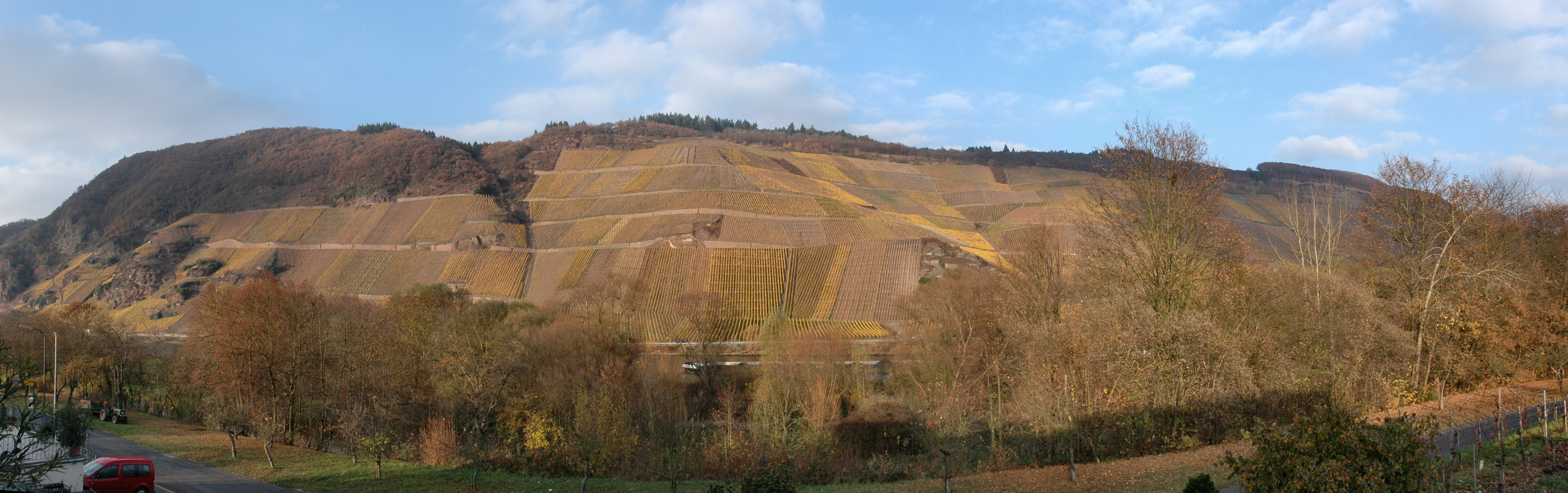 Weinberge in Erden an der Mosel This image was created with Hugin